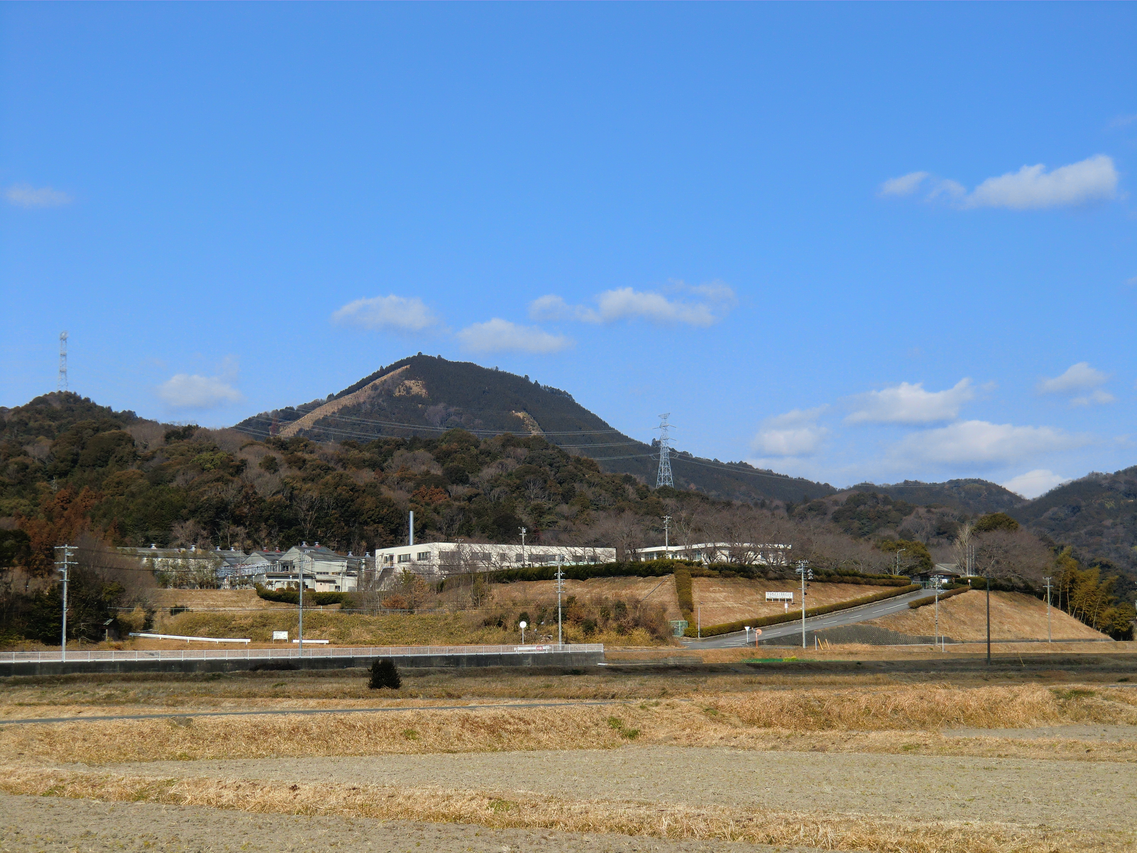 イソライト工業音羽工場。愛知県豊川市萩町